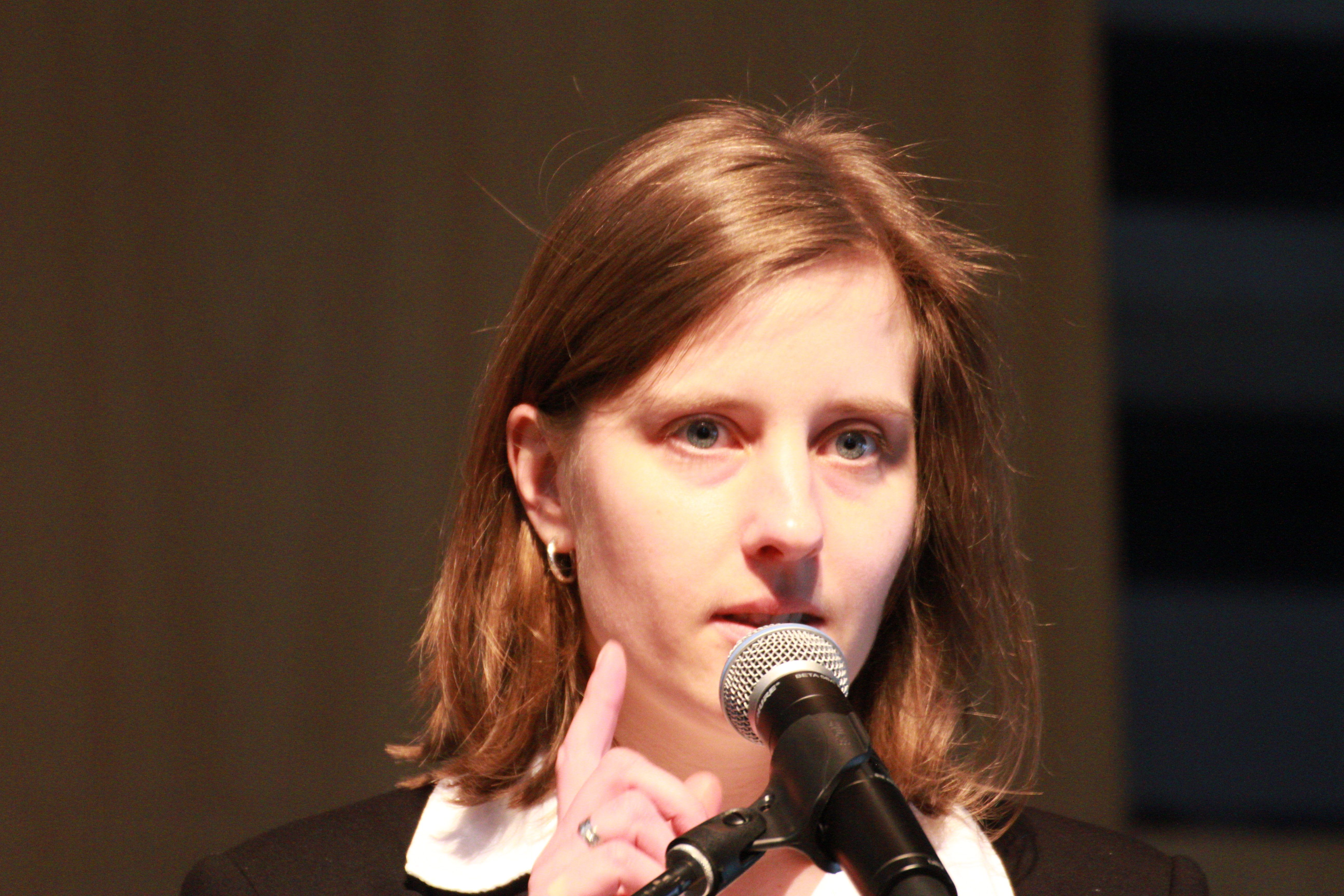 Sibylla Vričić Hausmann bei ihrer Lesung beim Literarischen März 2015